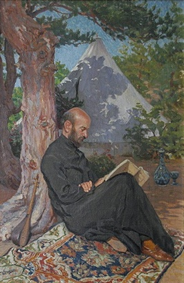 Панос Терлемезян, «Портрет Комитаса»